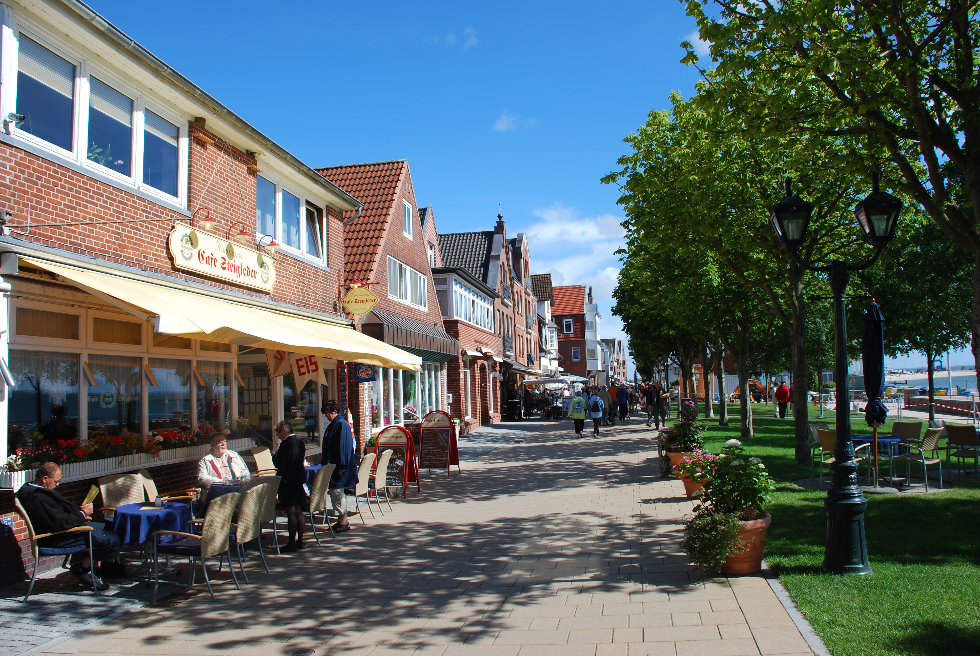 Strandwall in Wyk auf Föhr